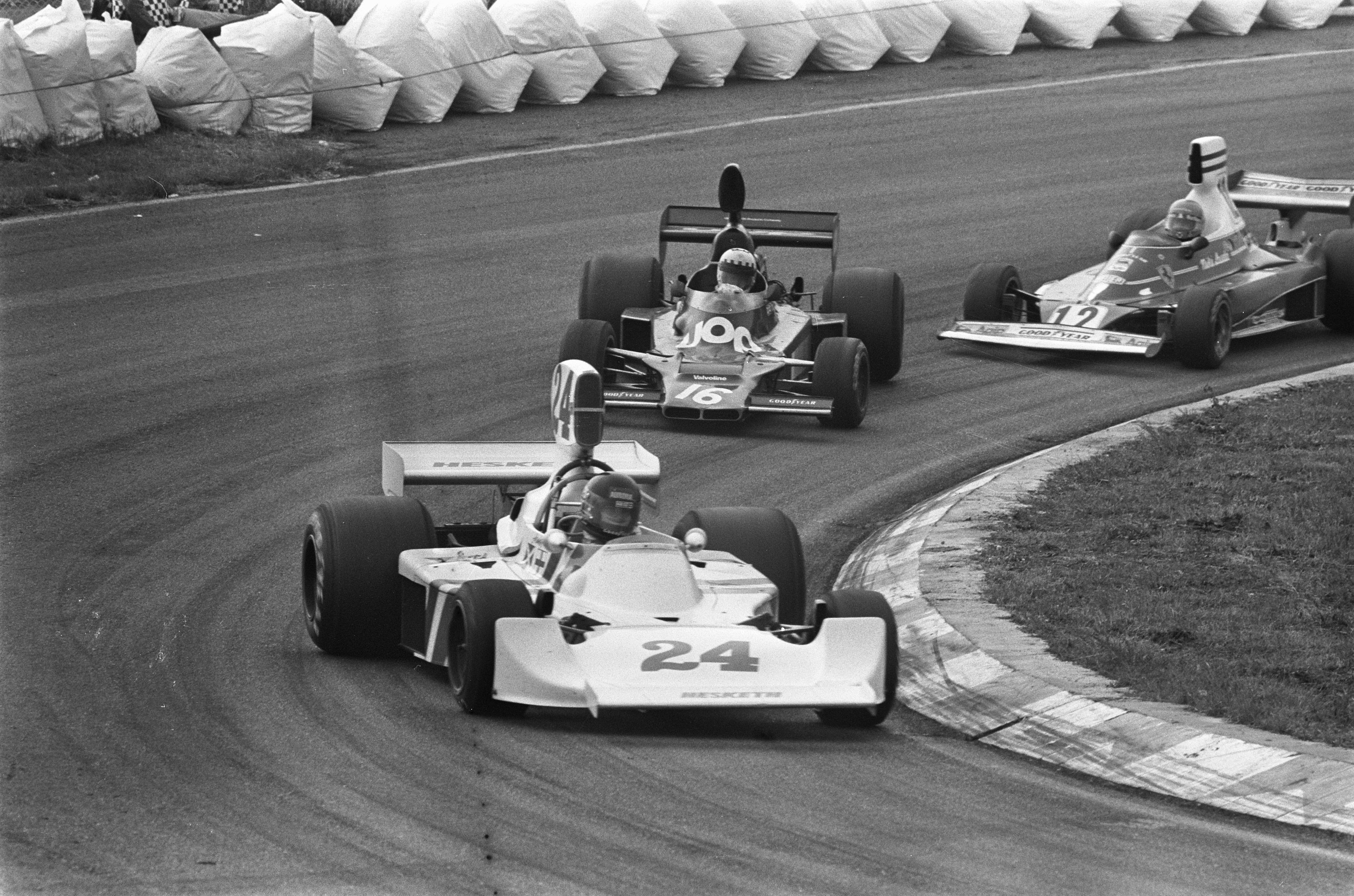 Hunt (24) gevolgd door Price (16) en Lauda (12).